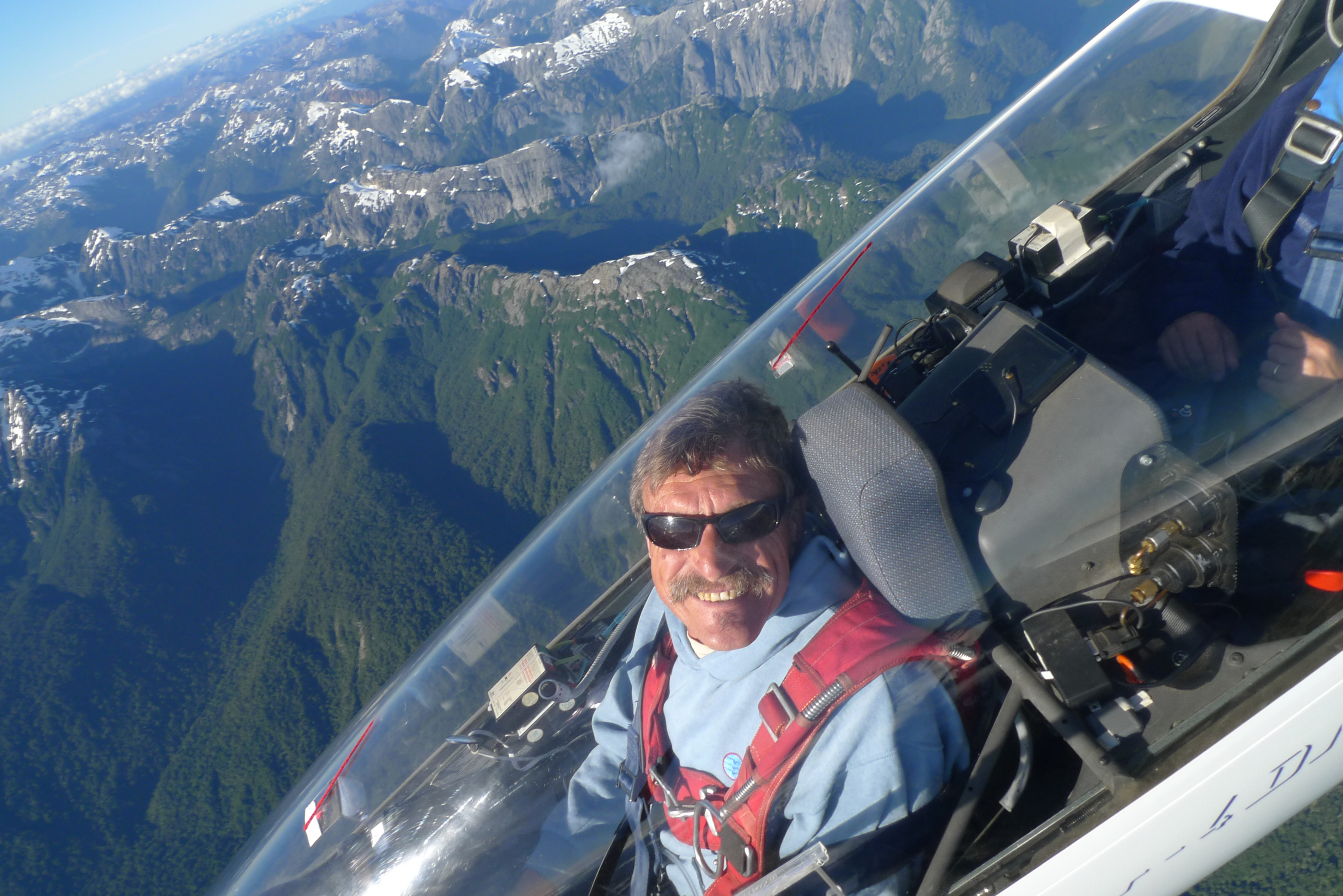 Klaus OHLMANN en vol dans un planeur